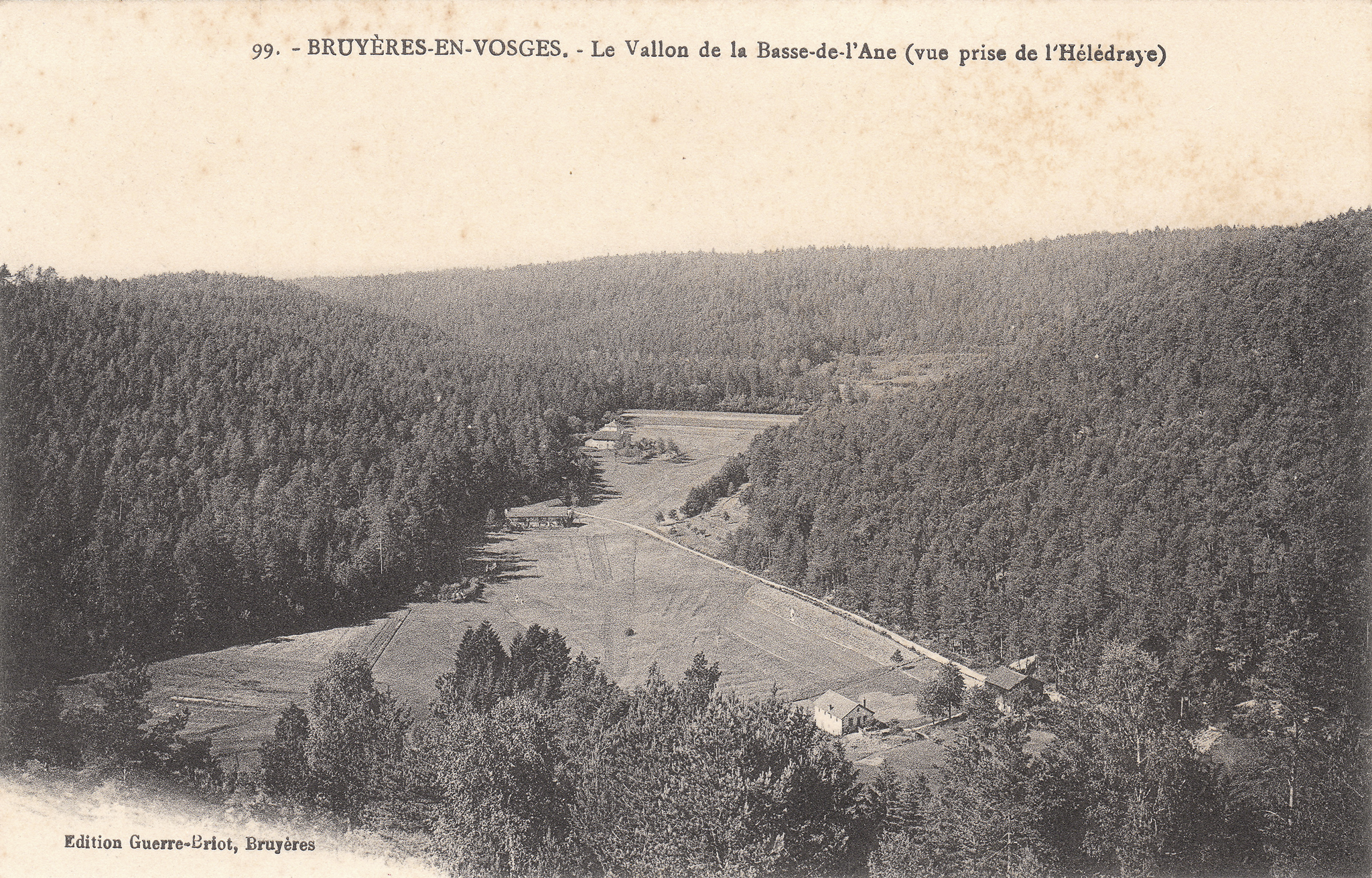 Carte postale ancienne Editions Guerre-Briot, Bruyères, de Bruyères-en-Vosges - Le Vallon de la Basse de l'Âne (vue prise de l'Helledraye)